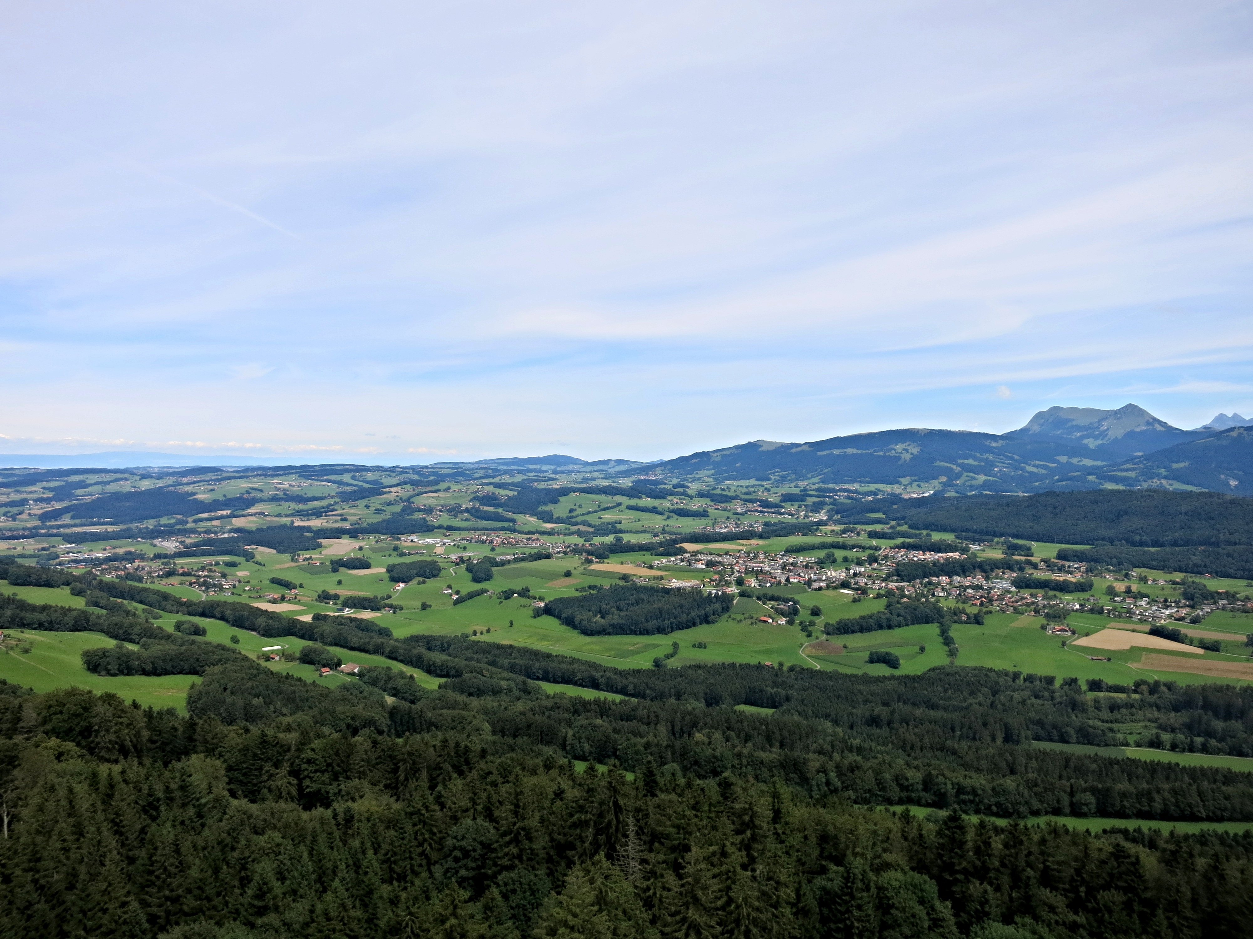 Aussicht vom Mont Pèlerin Fernsehturm Richtung Nord Osten